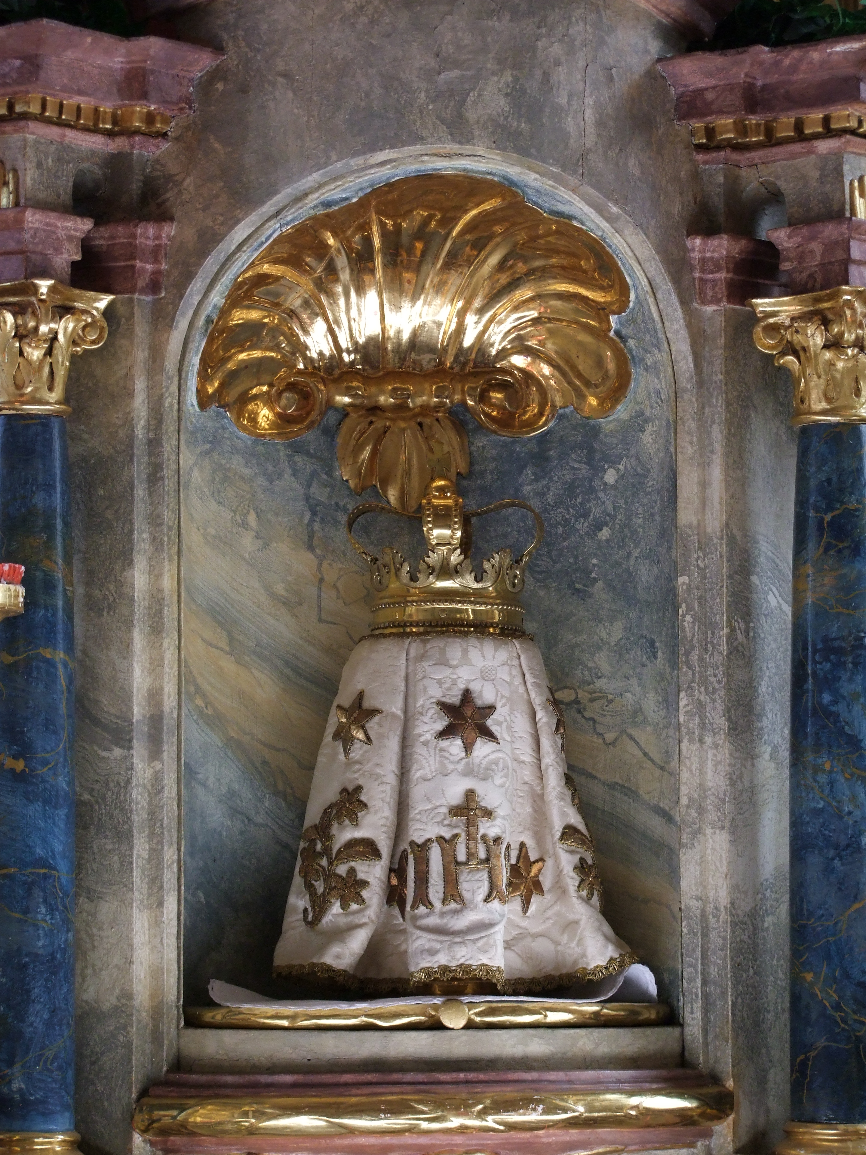 Unserer Lieben Frau im oberschwäbischen Oberrammingen,, Ortsteil von Rammingen in Bayern/Schwaben